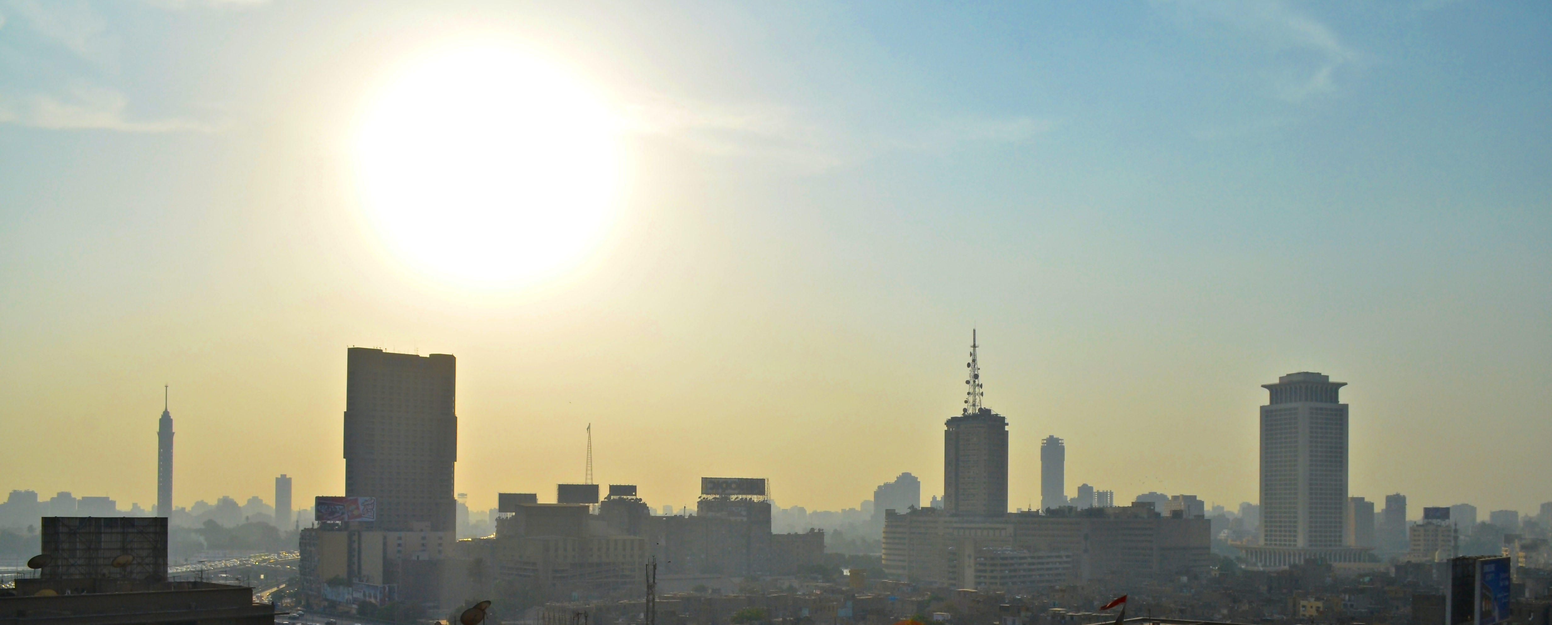 صورة بانورامية للقاهرة.